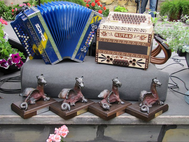 Nagrade festivala Vurberk.